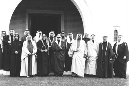 التشكيل الوزاري السادس في دولة الكويت. في العام: 1967. The sixth cabinet in the history of Kuwait (1967).